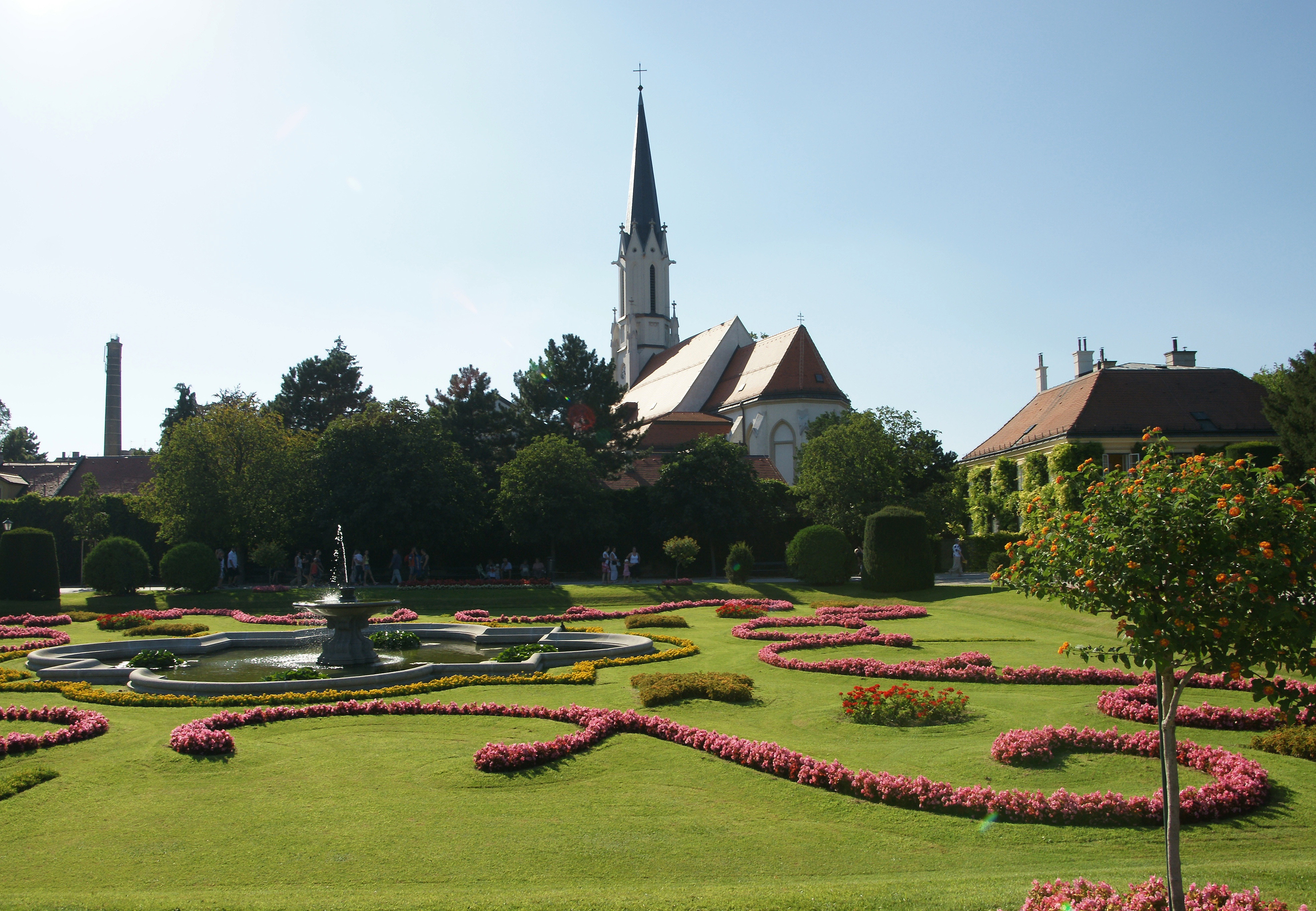 Die Hietzinger Pfarrkirche liegt im 13. Wiener Gemeindebezirk Hietzing und ist Mariä Geburt geweiht. Blick vom Schönbrunner Schlosspark in Wien.